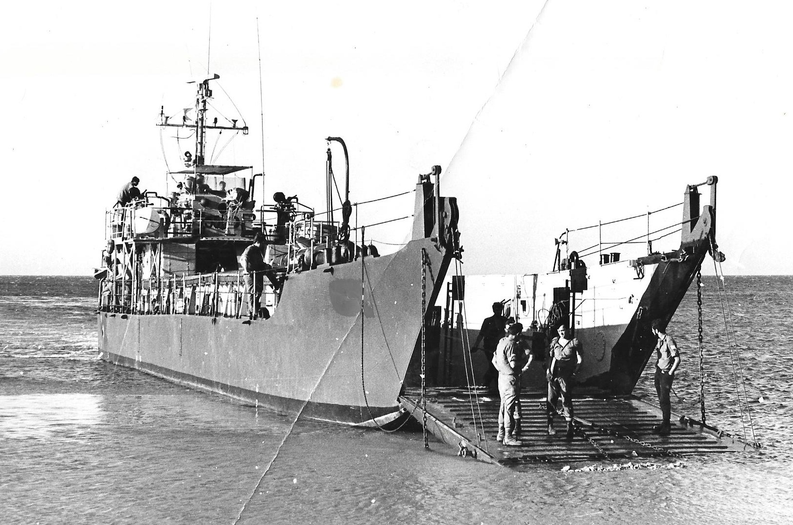 נחתת אח"י שקמונהפ-55 ממתינה בחוף דהב לכלי צמ"ה כדי להובילם לאיזור ההחפה.